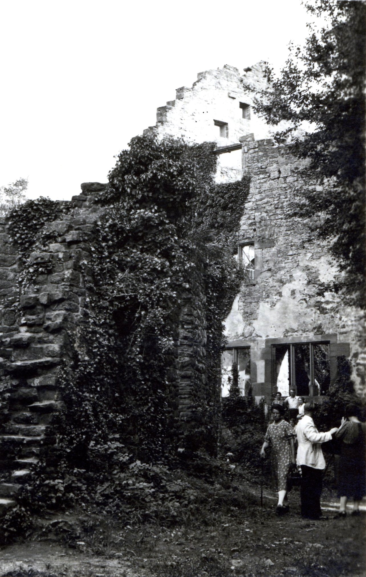 Minneburg bei Neckargerach im Juli oder August 1939